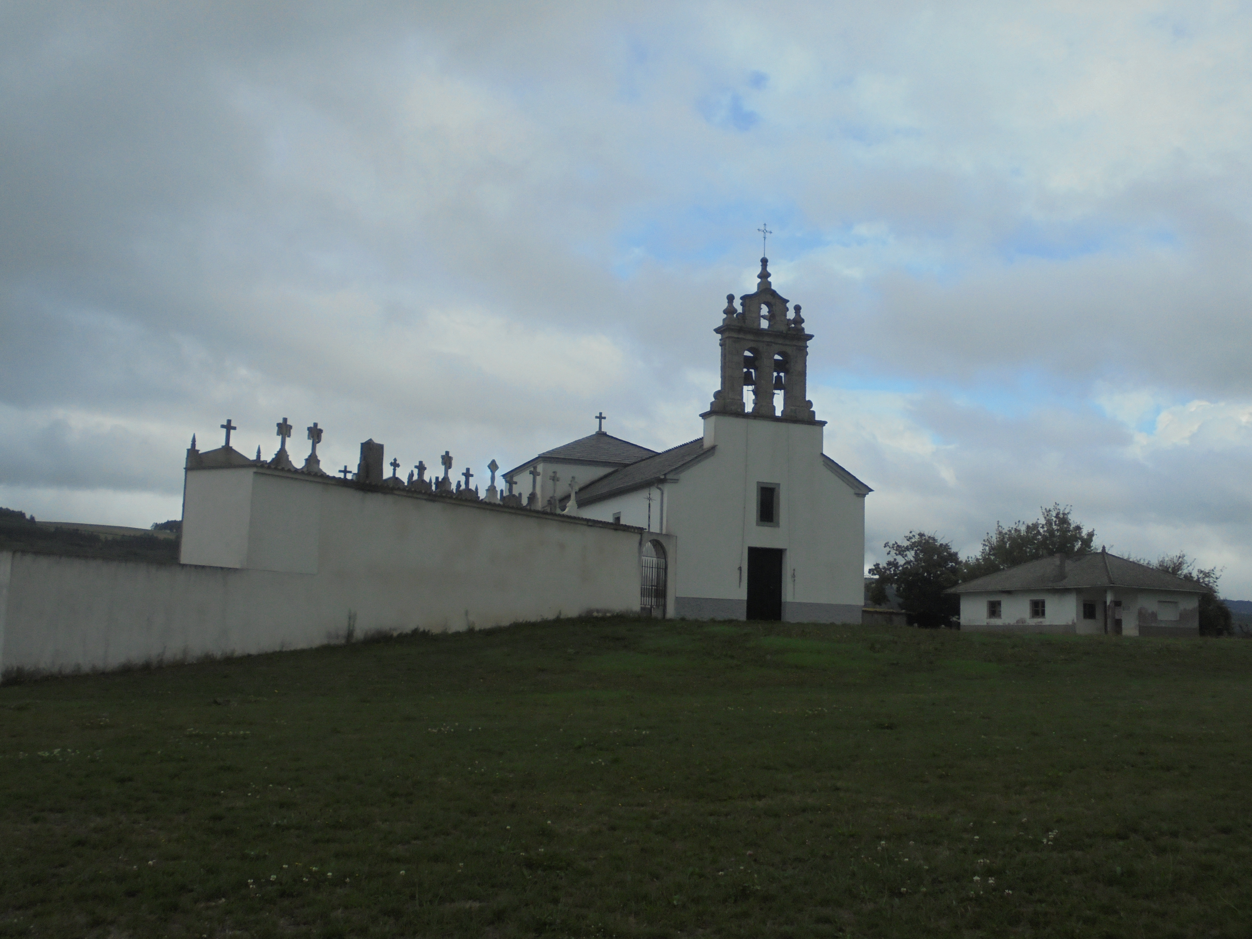 Igrexa parroquial de San Martiño de Ferreiros ( Pol)